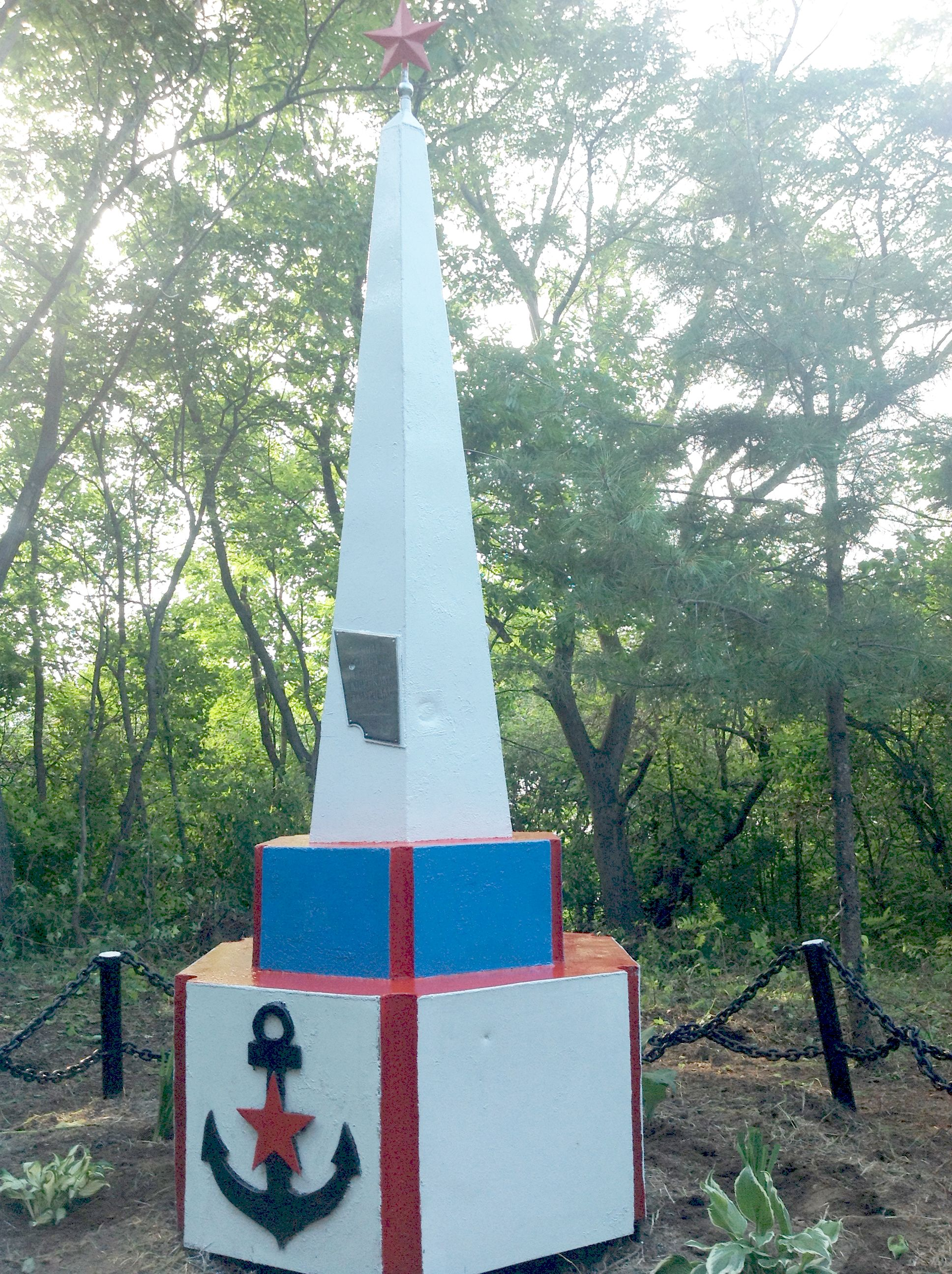 памятник